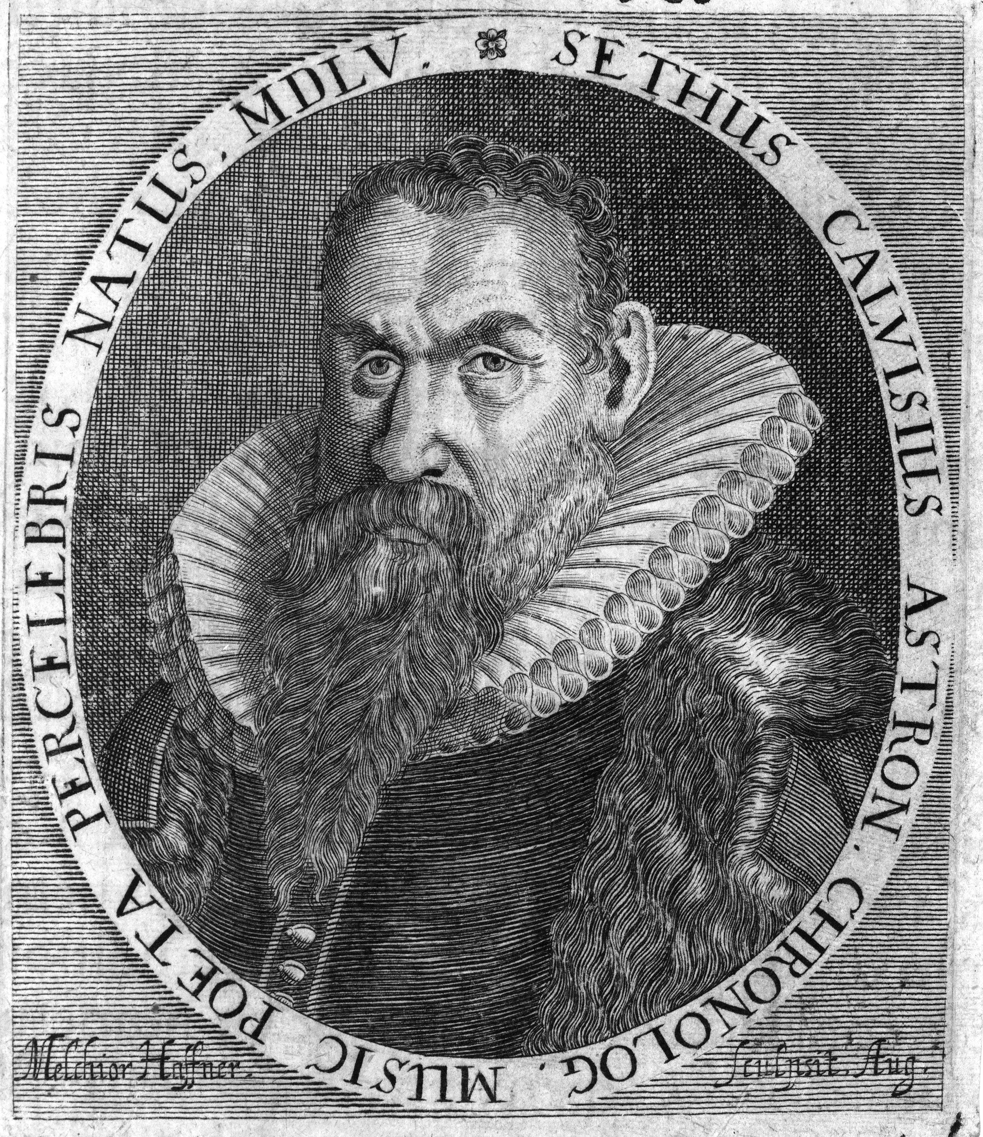 Sethus Calvisius (1556–1615). Radierung